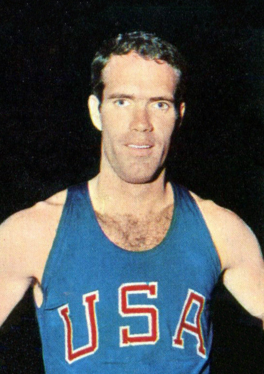 CAMPIONI DELLO SPORT 1969/70- n. 86 - BILL TOOMEY (USA)-DECATHLON